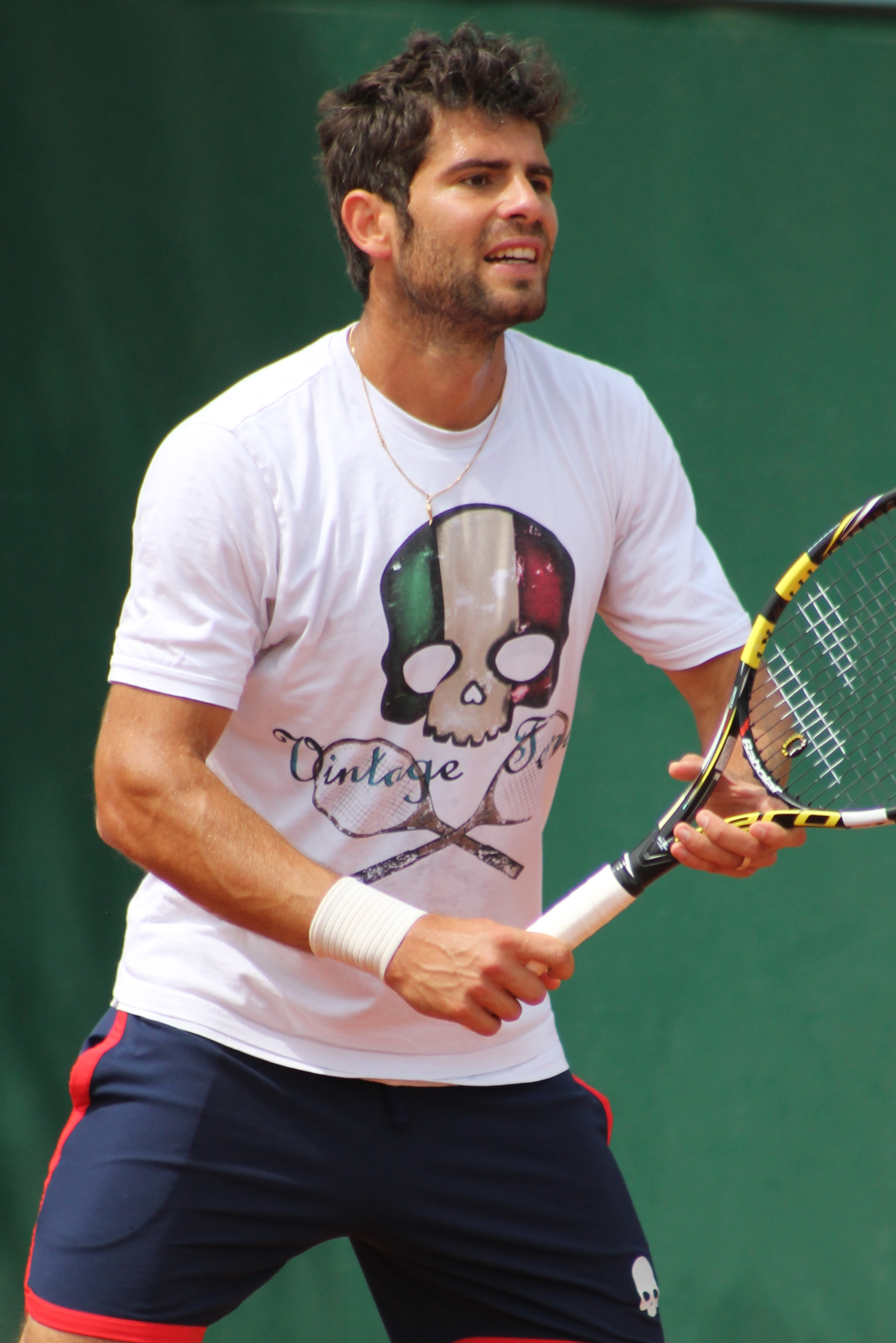 Bolelli RG15 (15)